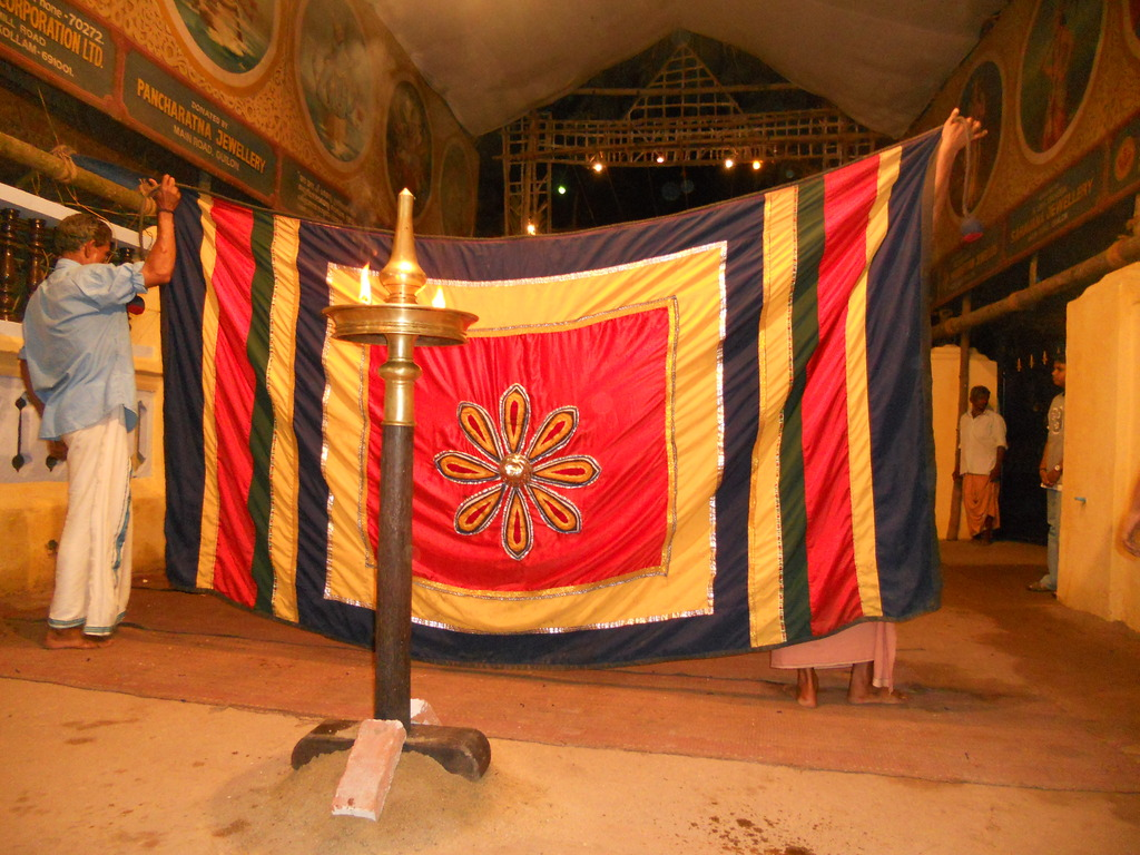 Kathakali thiraseela